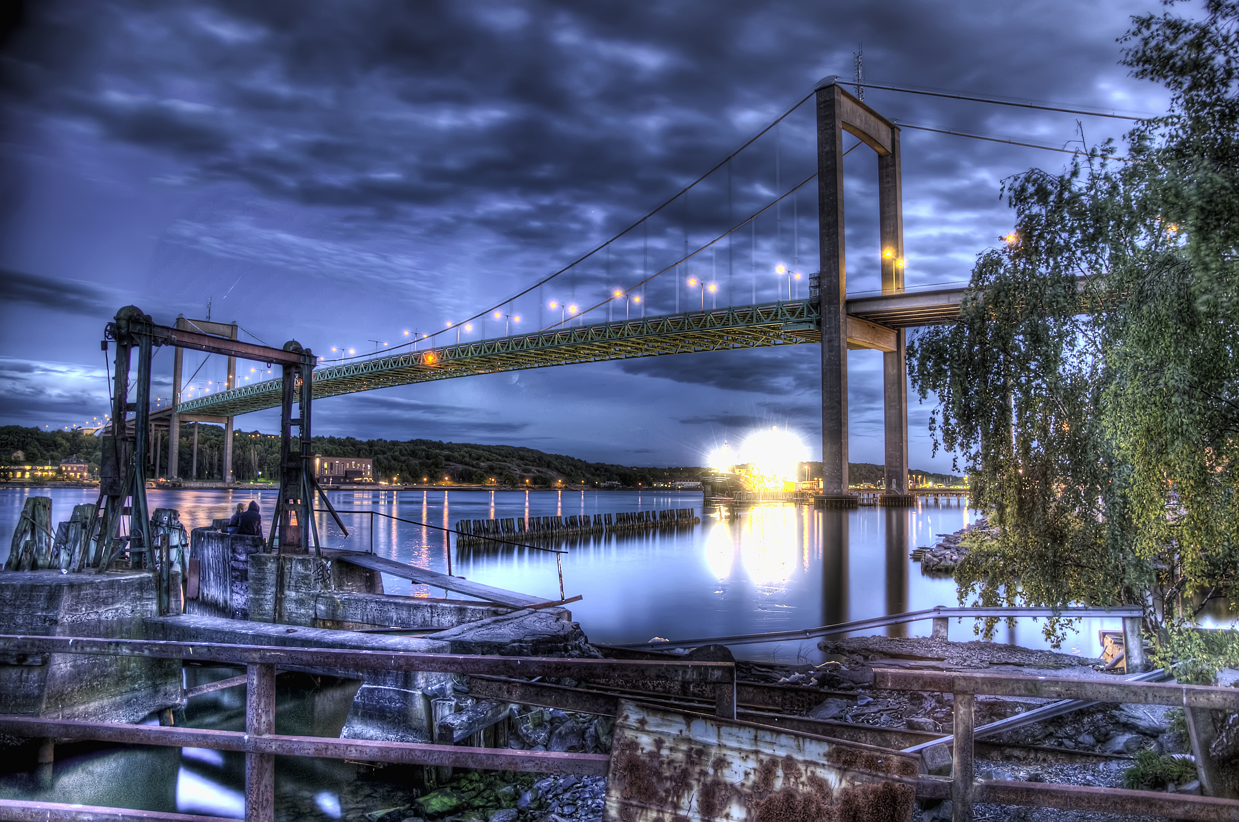 Il ponte Älvsborgsbron di Göteborg